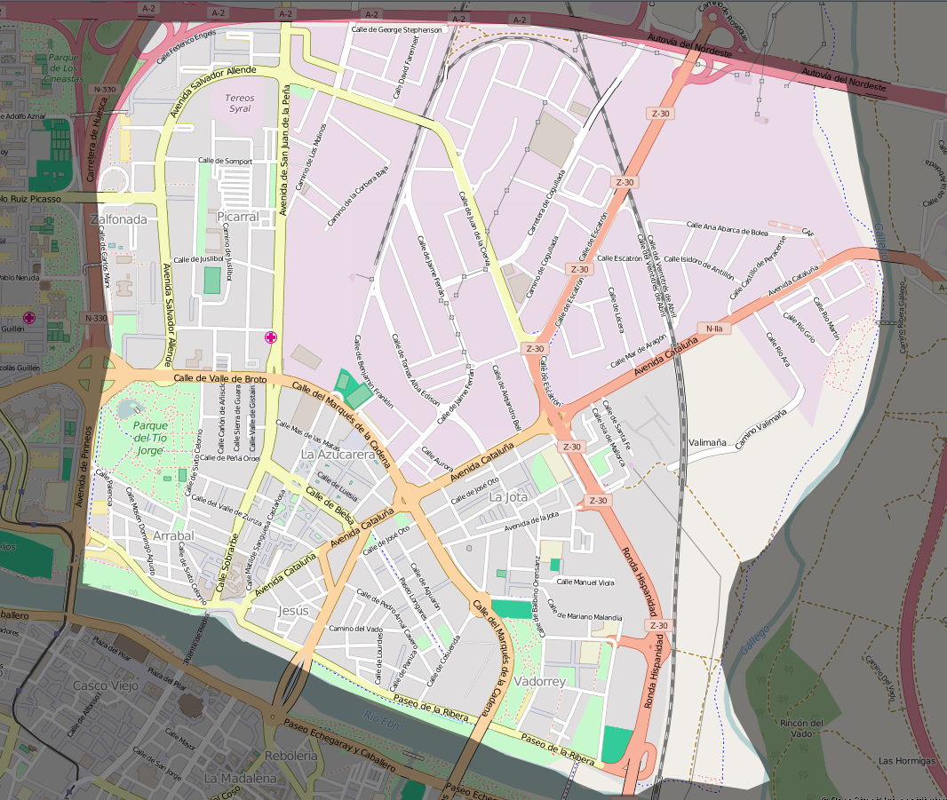 Mapa del distrito El Rabal en Zaragoza.